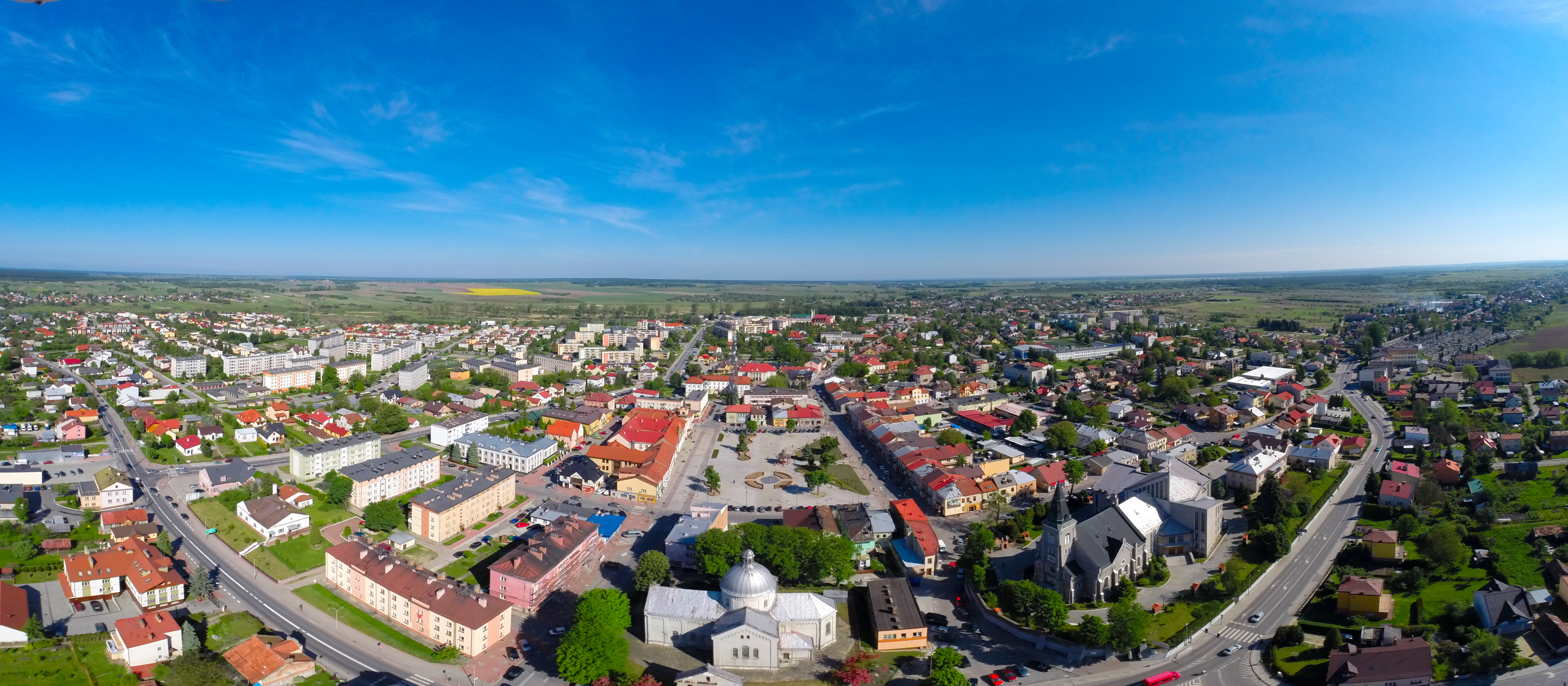 Panorama Lubaczowa w kierunku północnym